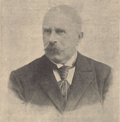 Адам Бонєцкі